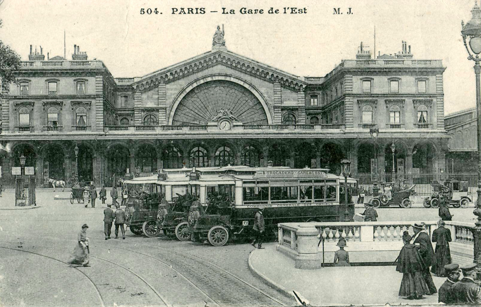 Carte postale ancienne éditée par M. J. n°504 :PARIS - La Gare de l'Est